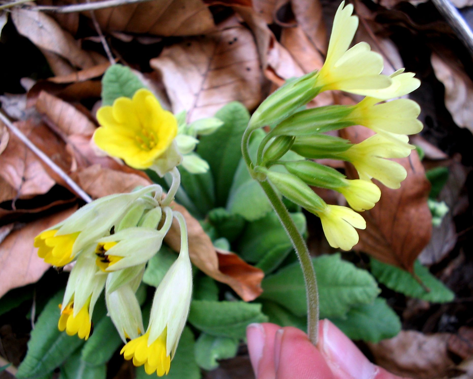 Vergleich Primula elatior / veris Fotografiert in Wachau, Niederösterreich (Austria)